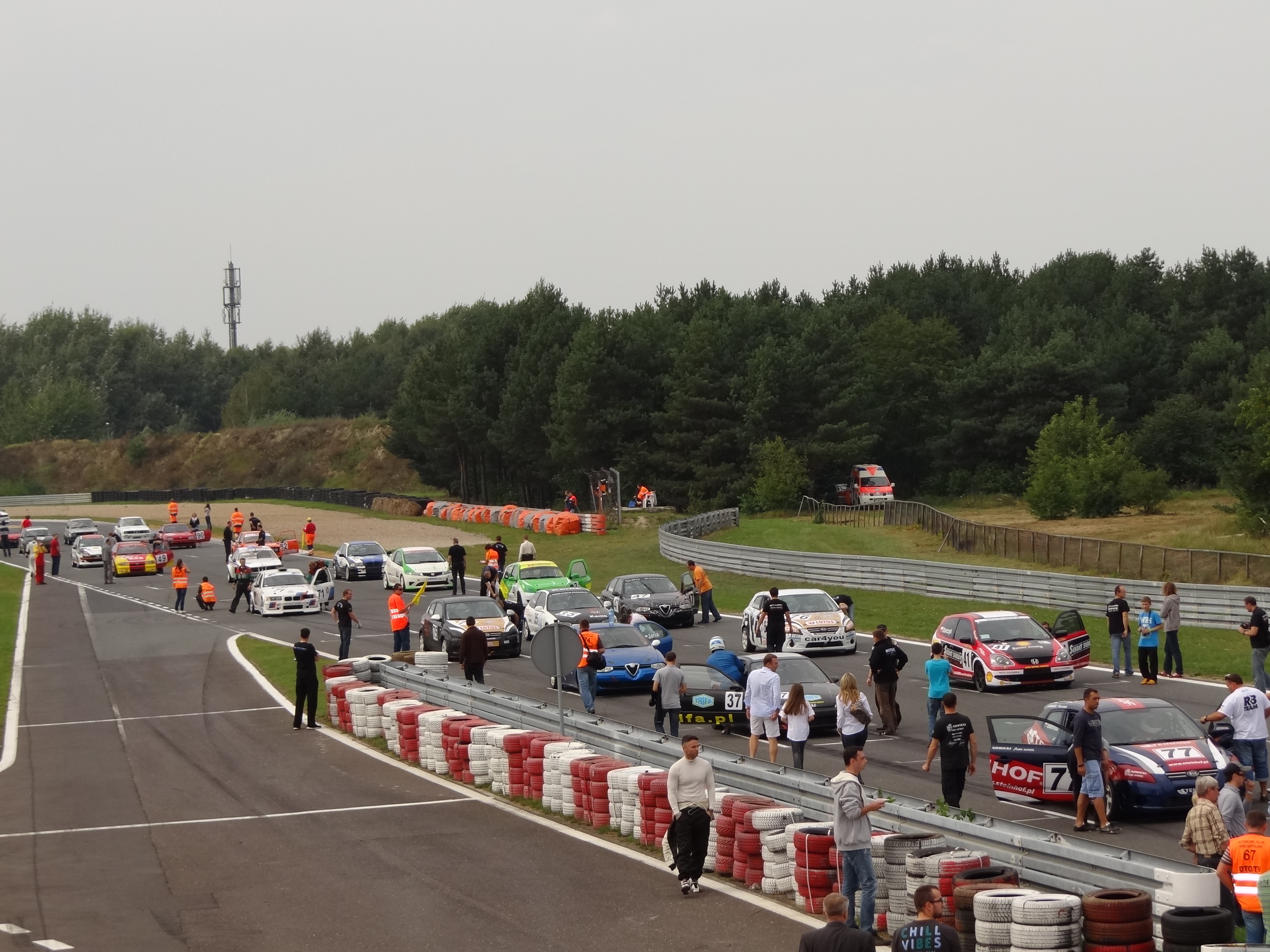 WPP wrzesień 2011